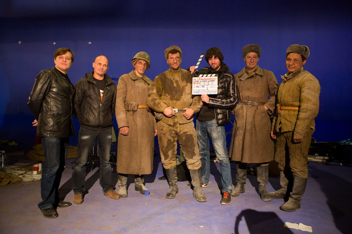 Актёры и участники съёмочной группы фильма "Двадцать восемь панфиловцев". Слева направо: консультант Артем Кокин, Андрей Шальопа, Олег Федоров (старшина Григорий Шемякин), Александр Устюгов (рядовой Иван Москаленко), Ким Дружинин, Яков Кучеревский (сержант Иван Добробабин), Азамат Нигманов (рядовой Мусабек Сенгирбаев).